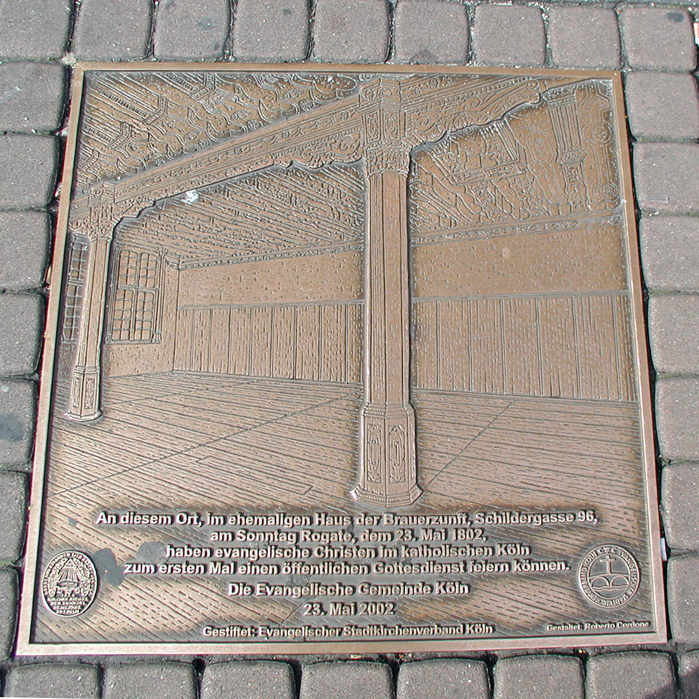 Köln Schildergasse 96. Standort des Brauerzunfthauses